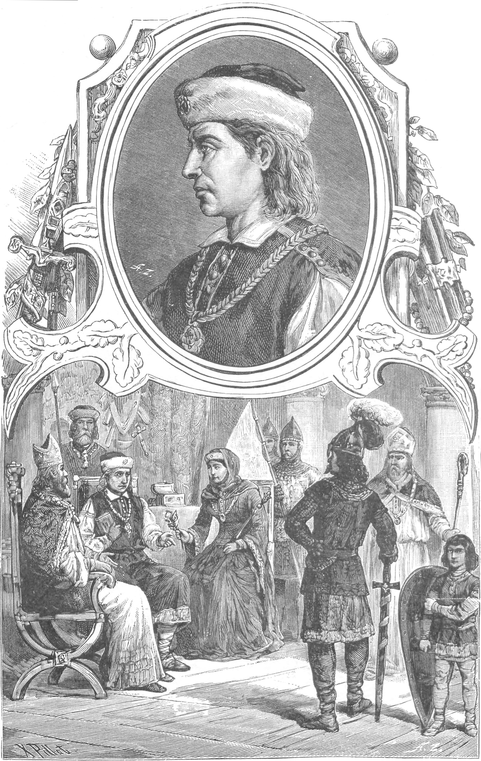 ilustracja z książki „Wizerunki książąt i królów polskich“